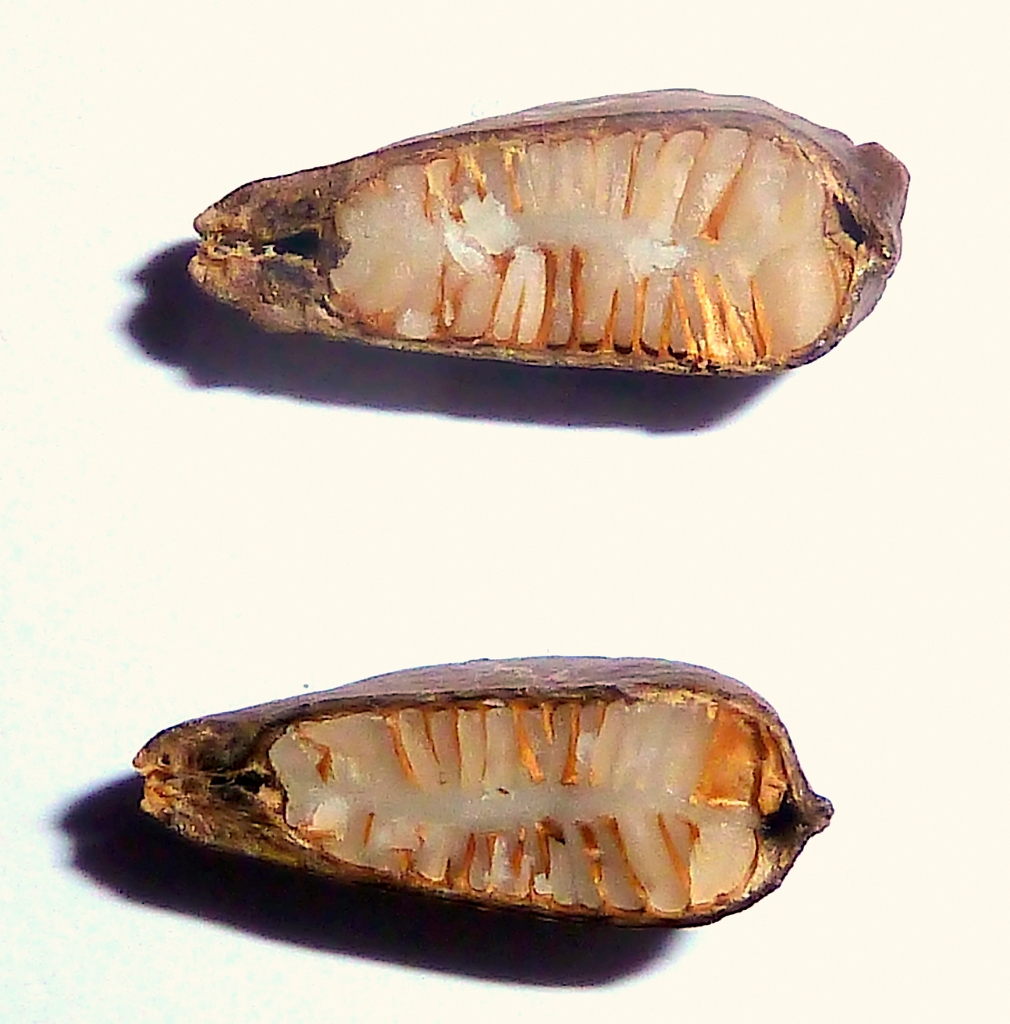 Annona cherimola (chirimoya ) : Semilla suelta - corte longitudinal evidenciando el endocarpo y el tegumento penetrando las fisuras del endosperma ruminado (ruminaciones laminiformes). También se ve claramente el rodete ecuatorial periférico, el micrópilo y el hilo.